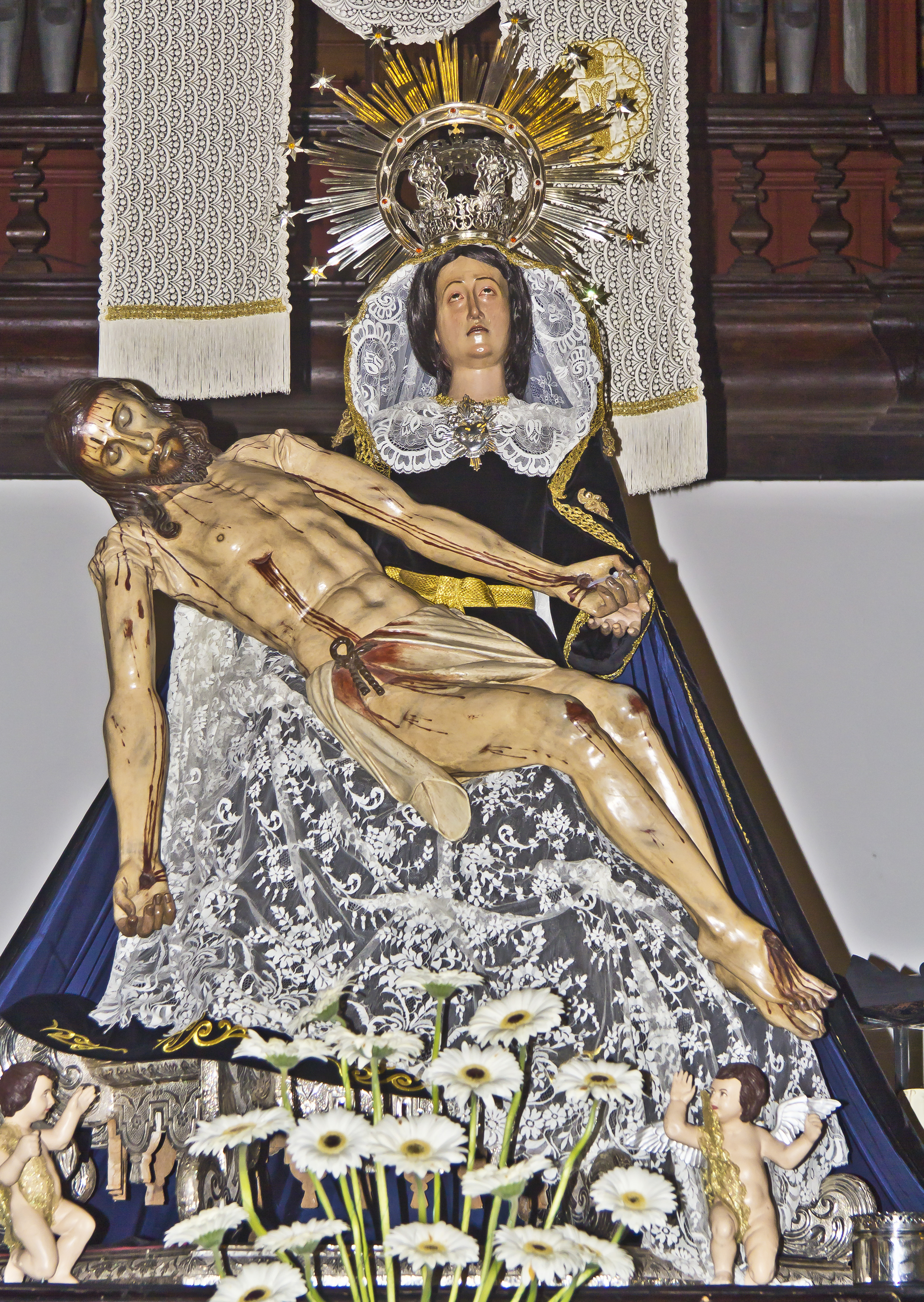 Paso de La Piedad